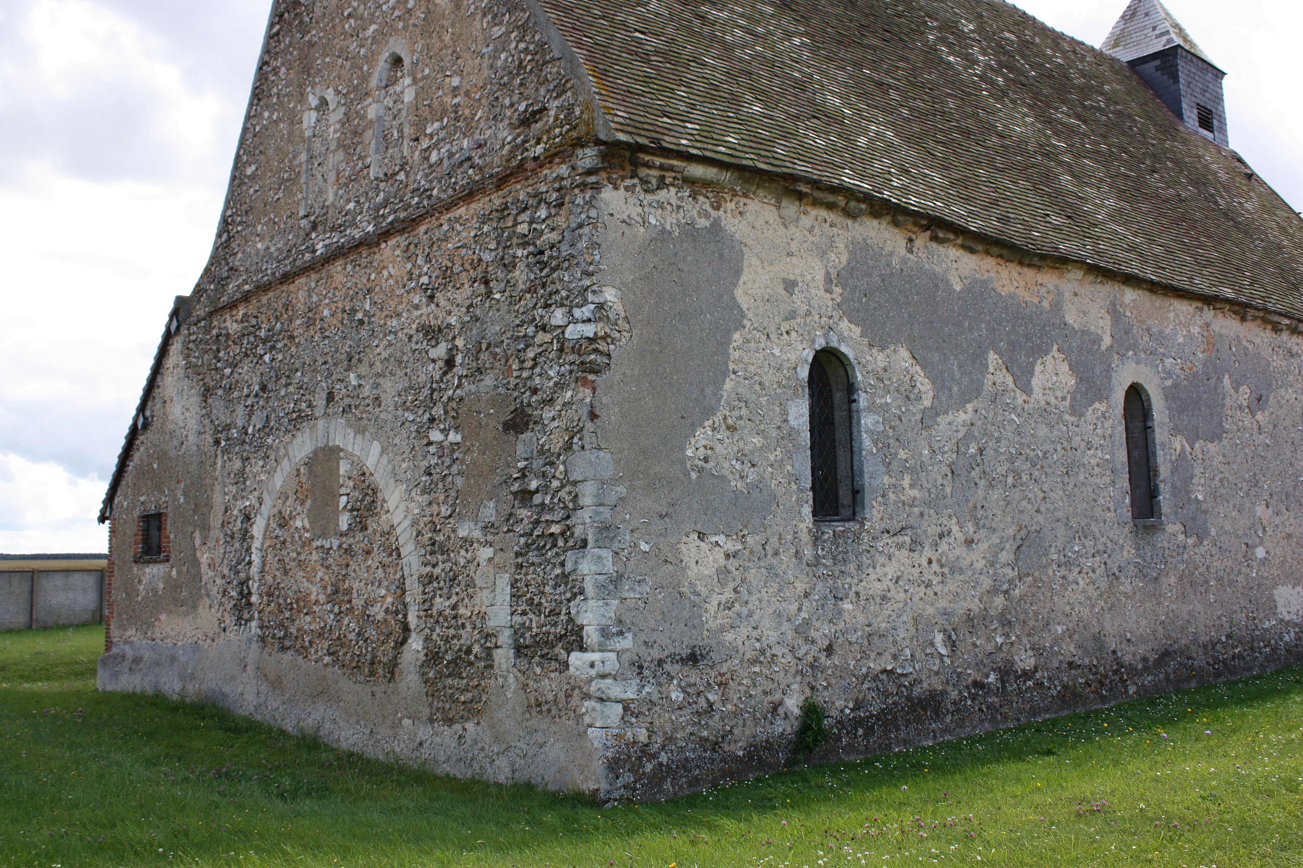 Allainville - Eglise Saint-Samson Eglise d'origine romane dont le chevet plat actuel semble porter un arc triomphal issu de la précédente église.